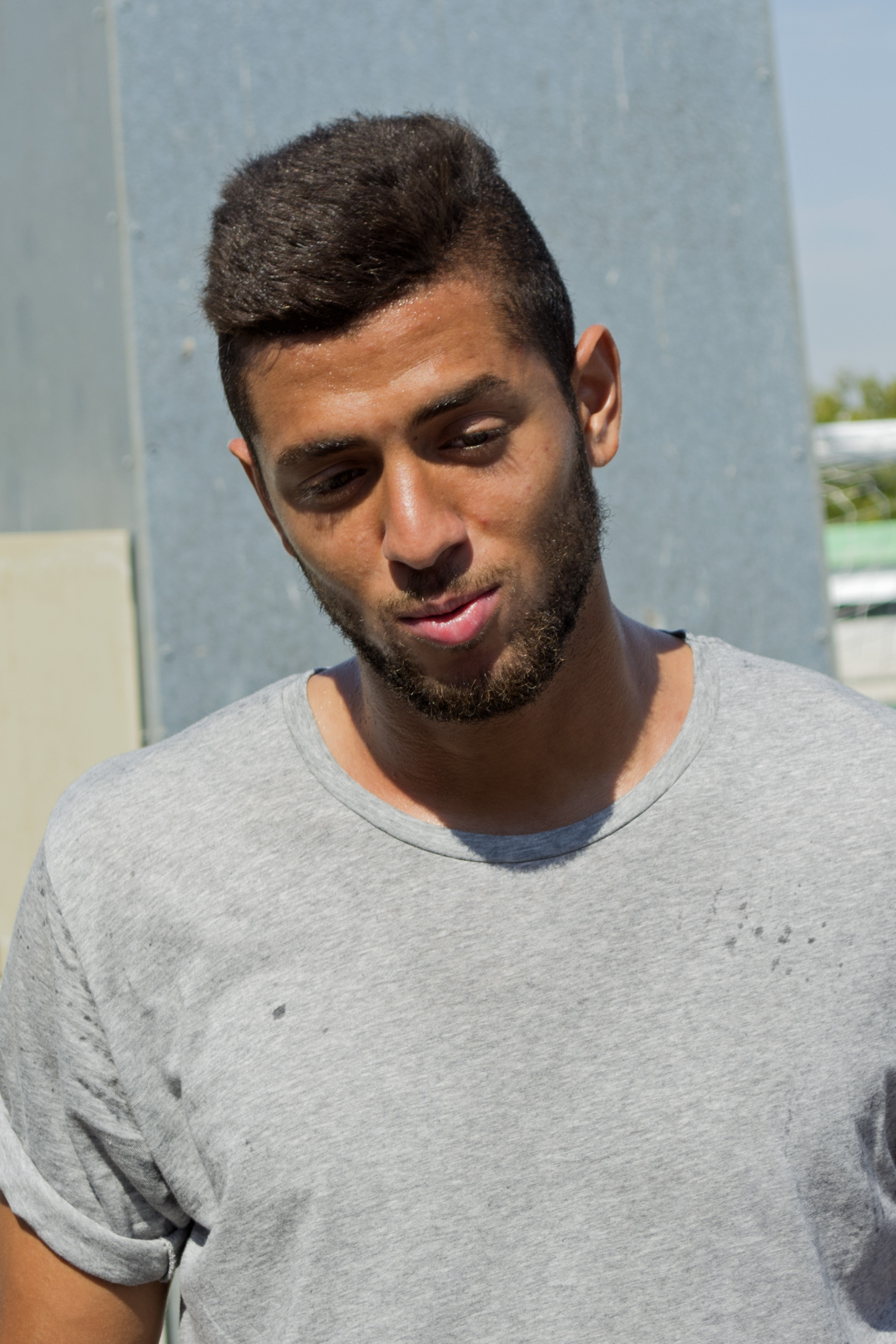 Amro Tarek, futbolista del Real Betis en 2015. Ciudad deportiva Luis del Sol